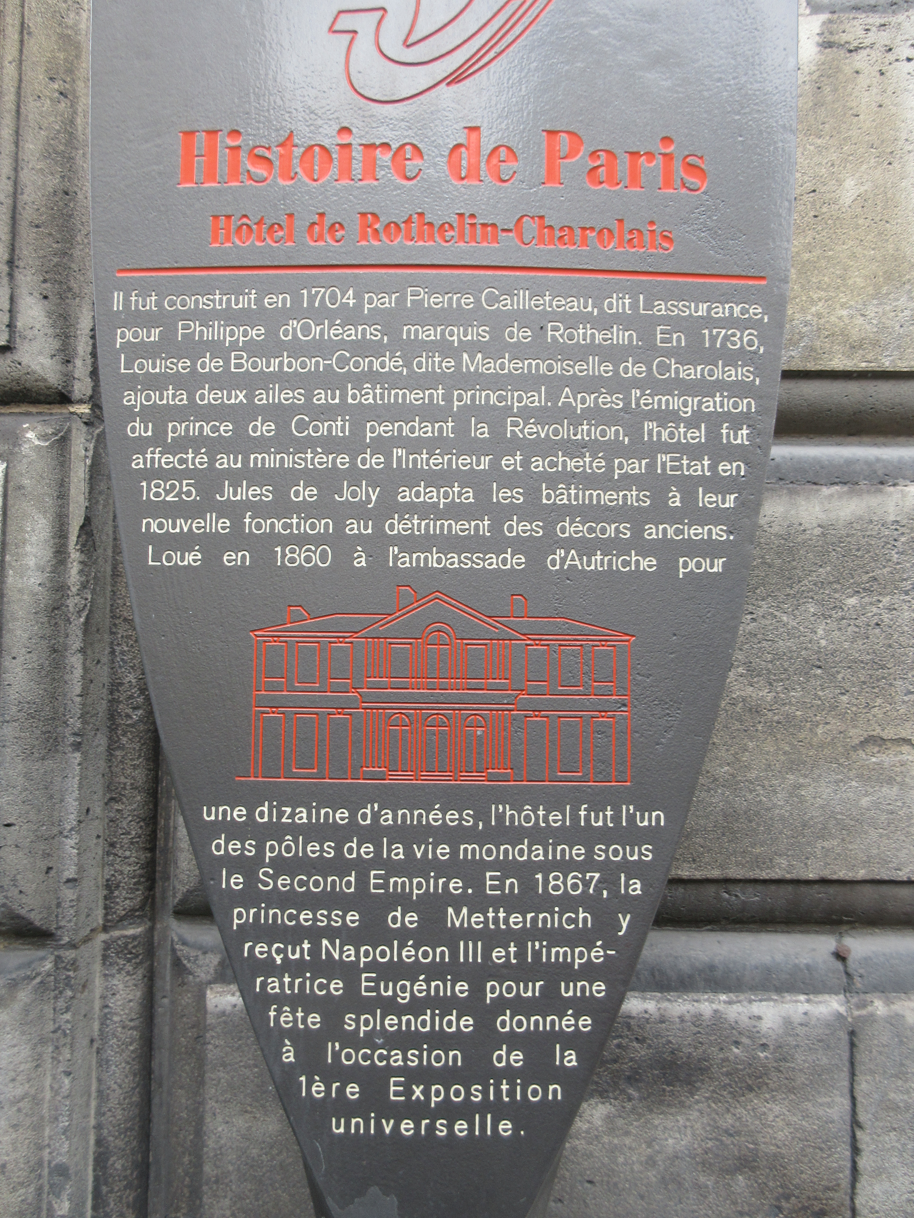 Panneau Histoire de Paris